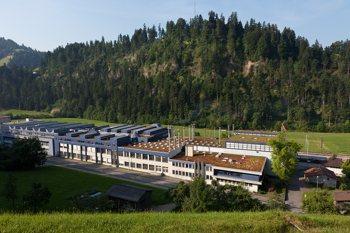 Die Biscuit-Fabrik Kambly in Trubschachen